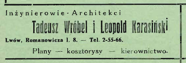 Реклама архітекторів Т. Врубеля та Л. Карасінського у часописі Zycie techniczne, № 7-8, 1936.